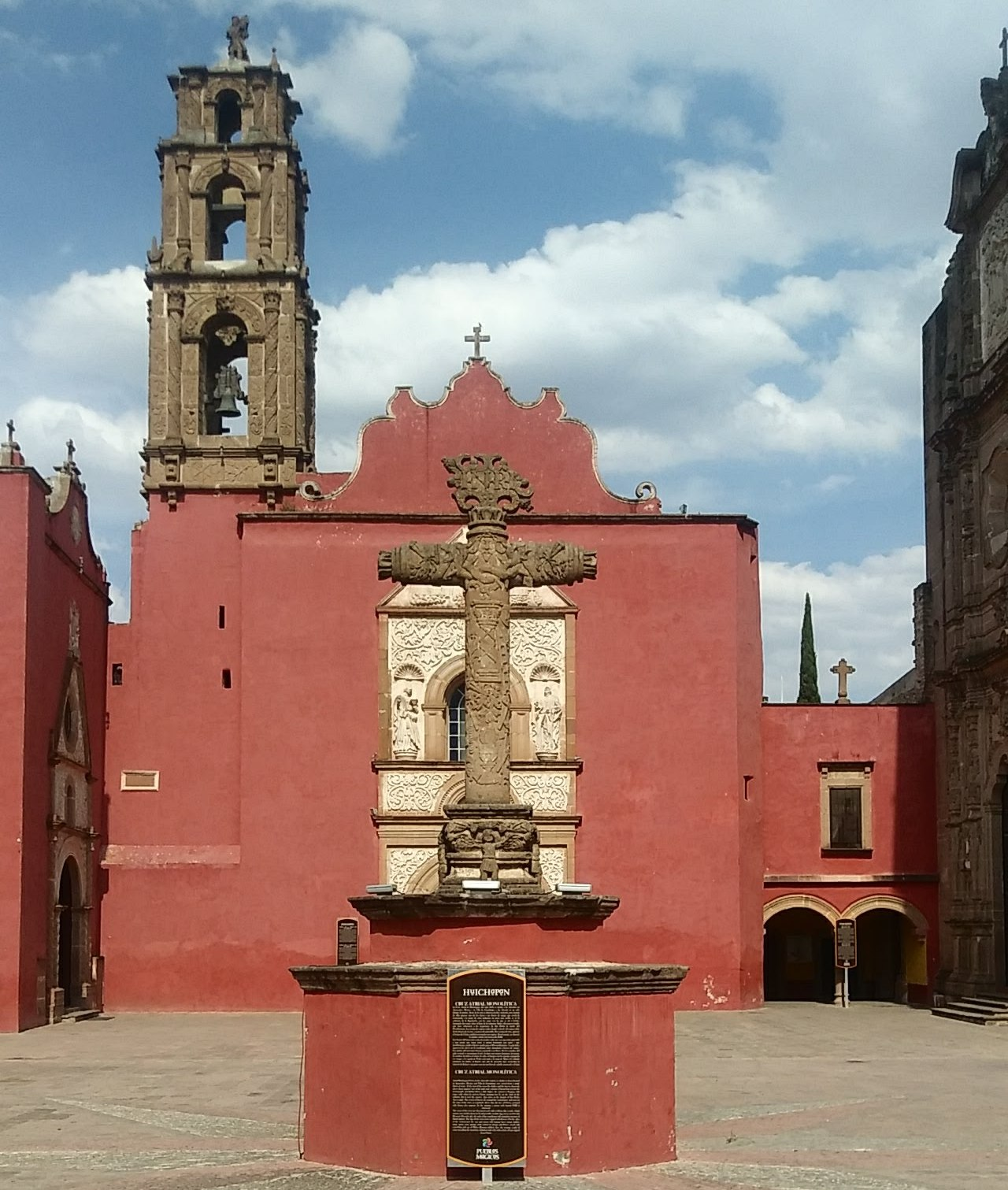 Parroquía de San Mateo Apostol, Huichapan, Hidalgo, México.